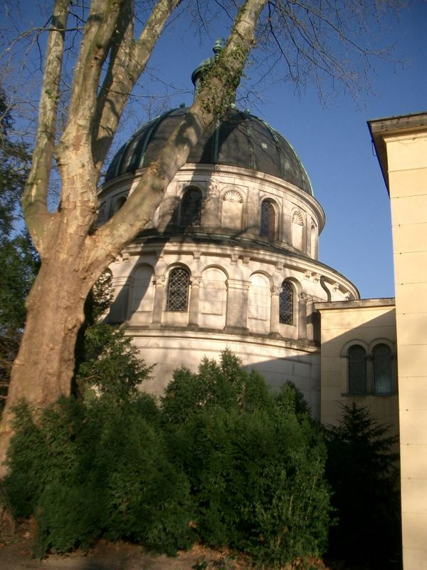 Mausoleum